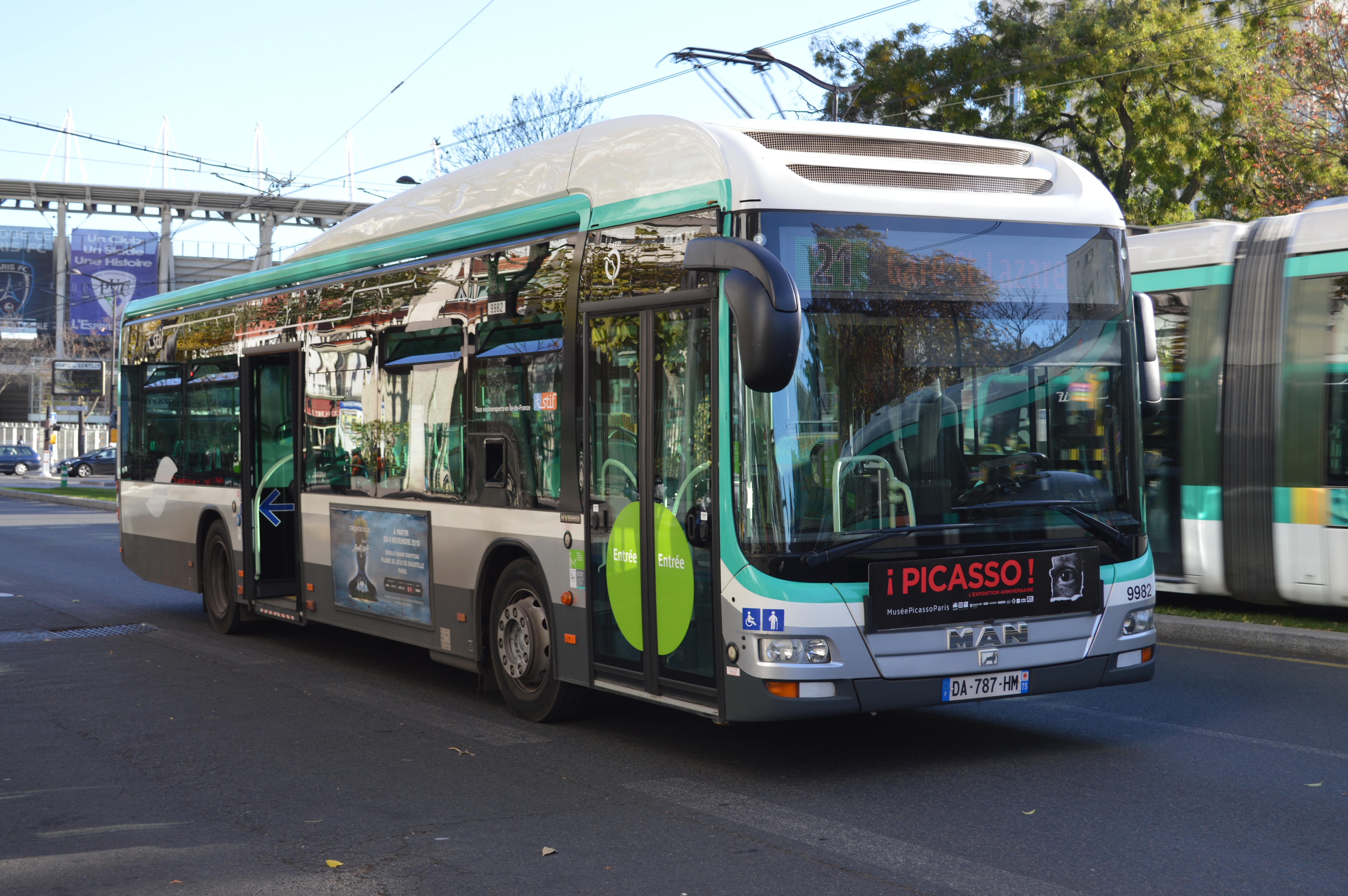 MAN Lion's City Hybrid de la RATP, sur la Ligne 21, à son terminus, a Stade Charlety - Porte de Gentilly.